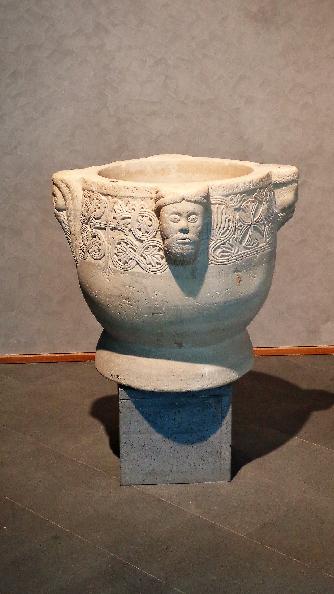 Fonte